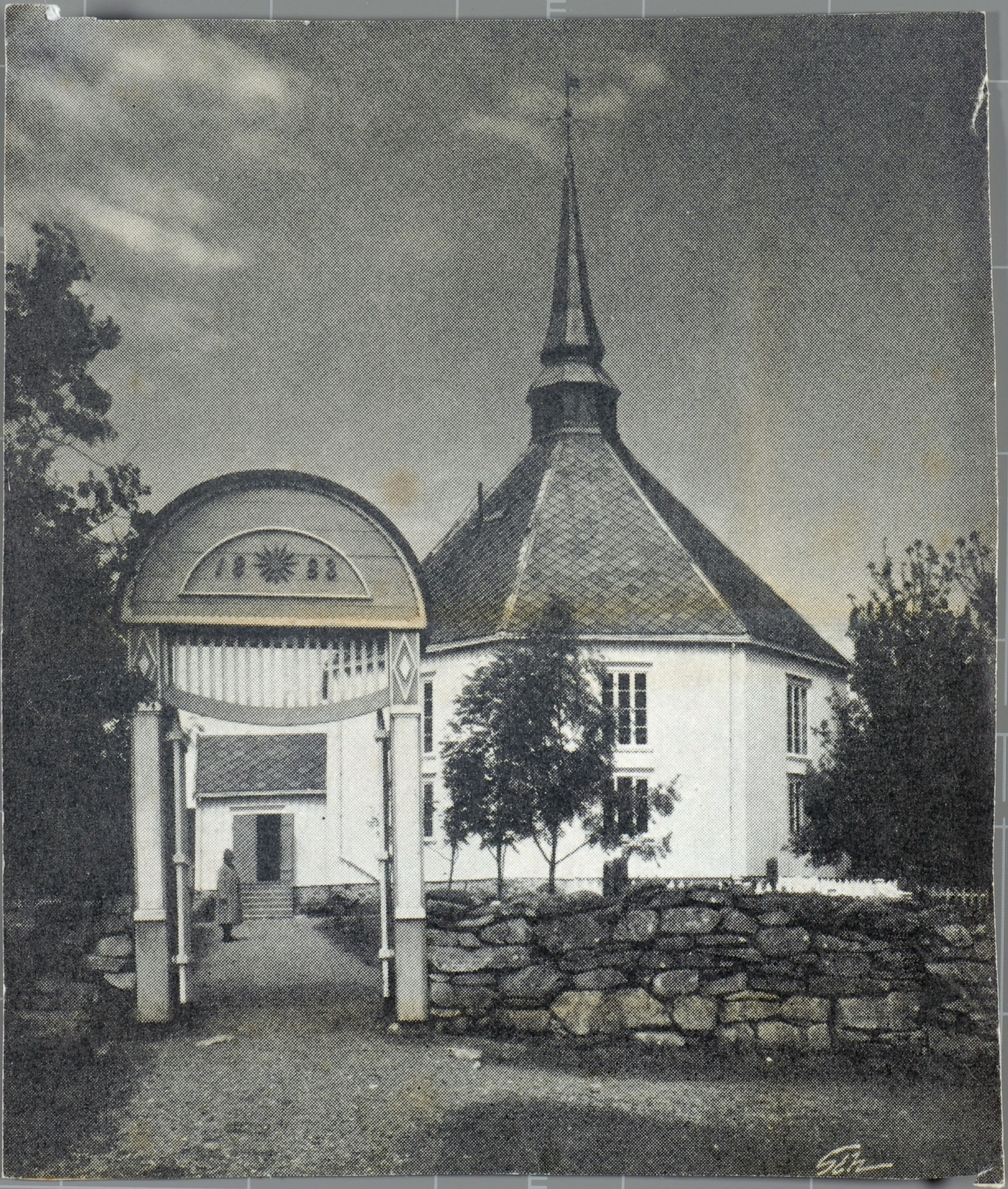 Hemne church, Norway